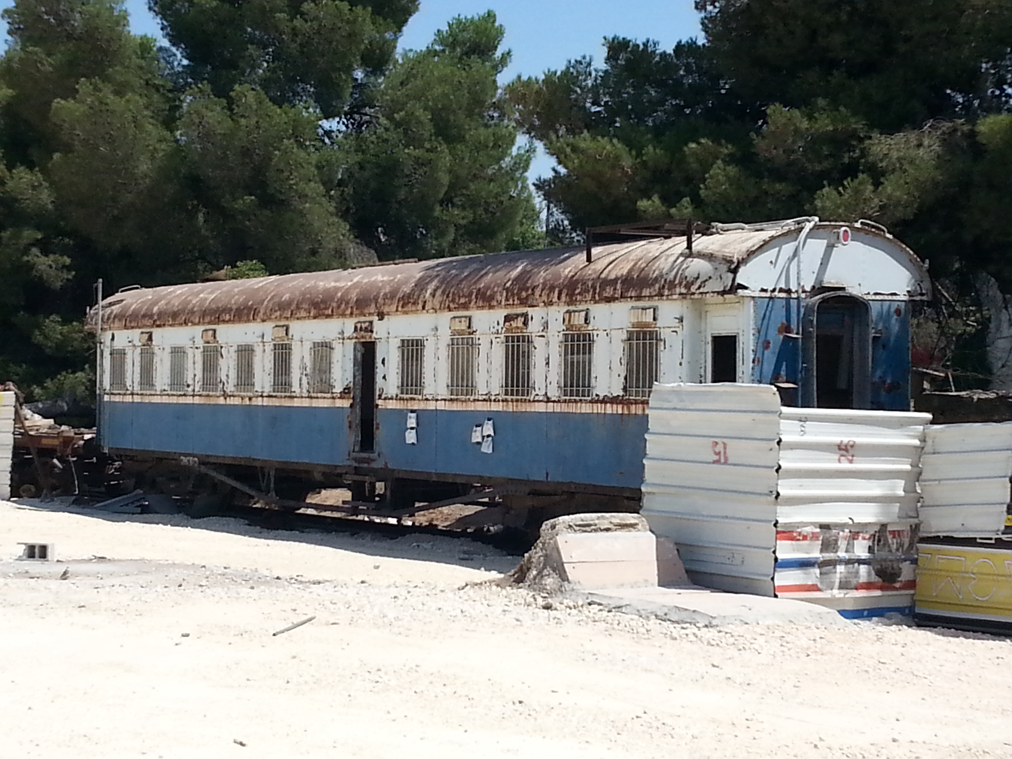 קרון נוסעים מס' 322 שנבנה ב-1922 על-ידי חברת בירמינגהאם הבריטית מוצב בתחנת רכבת הישנה של ירושלים